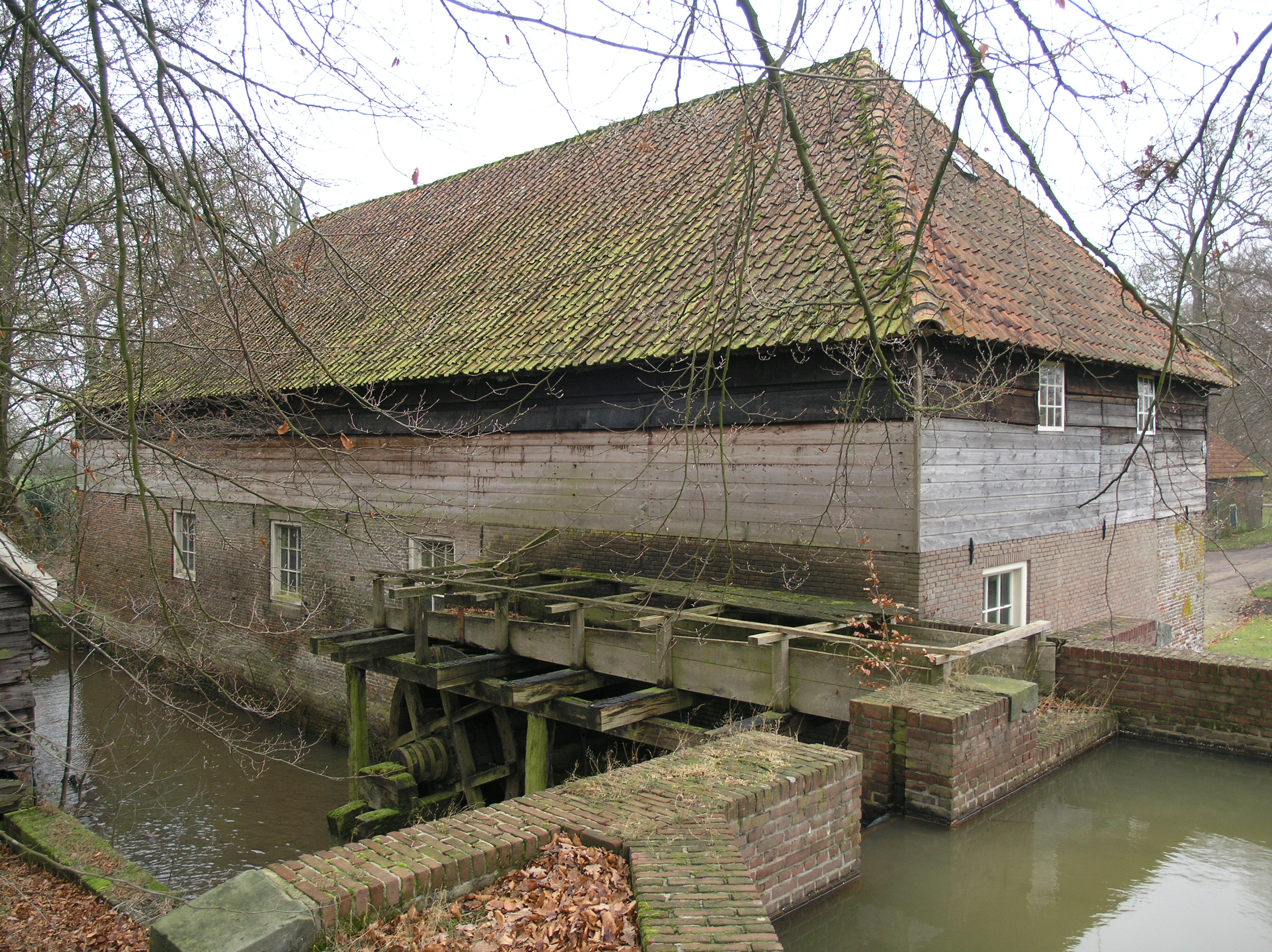 Zuuk Kopermolen